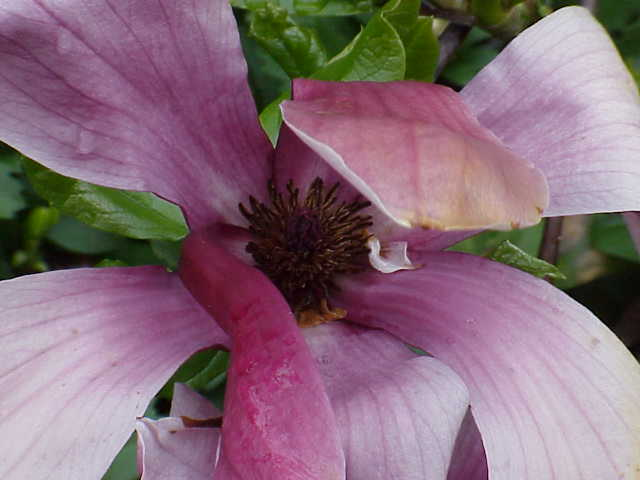 Magnolia liliiflora, Family: Magnoliaceae, Image no. 2